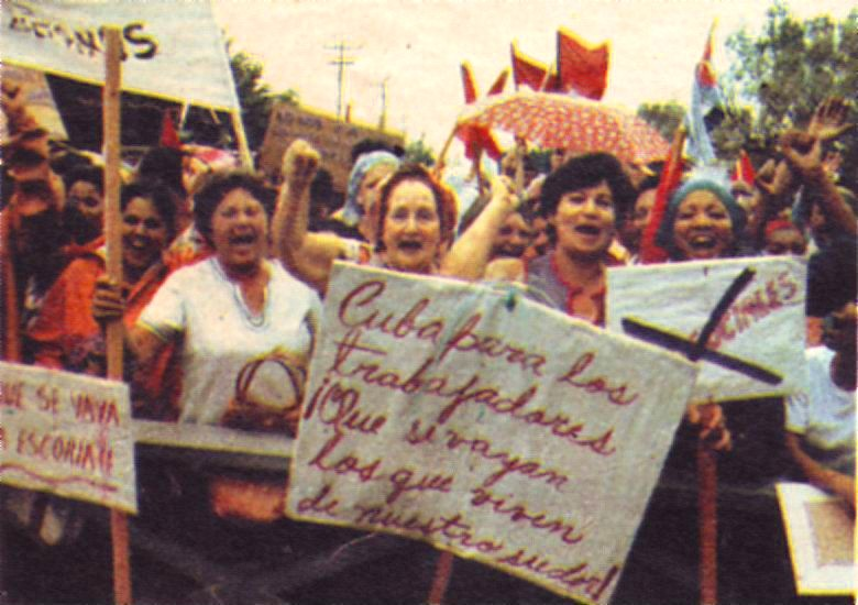 Manifestaciones en Cuba durante el Éxodo de Mariel en apoyo al gobierno de Fidel Castro.